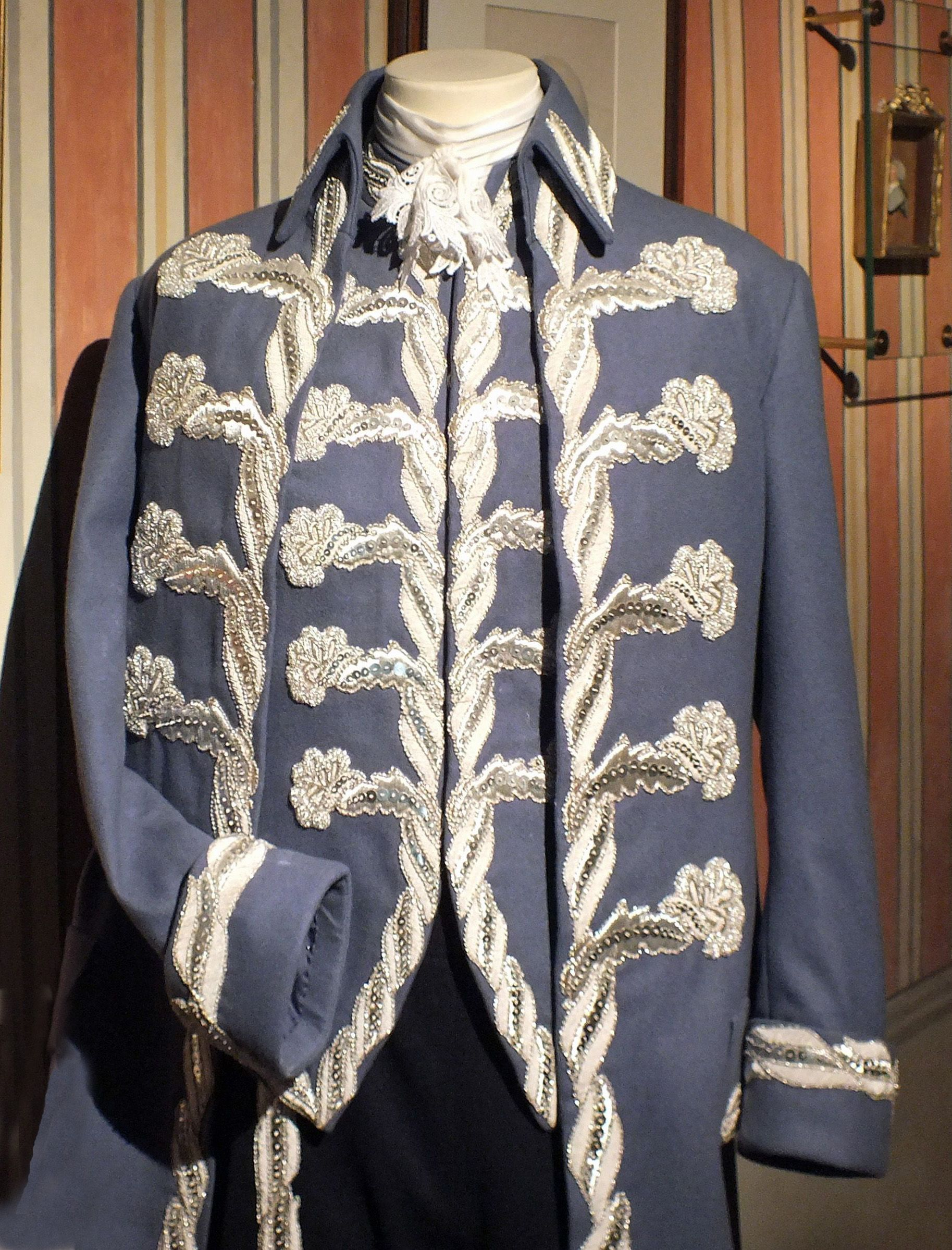 Haydns Dienstkleidung im Haydn-Haus in Eisenstadt